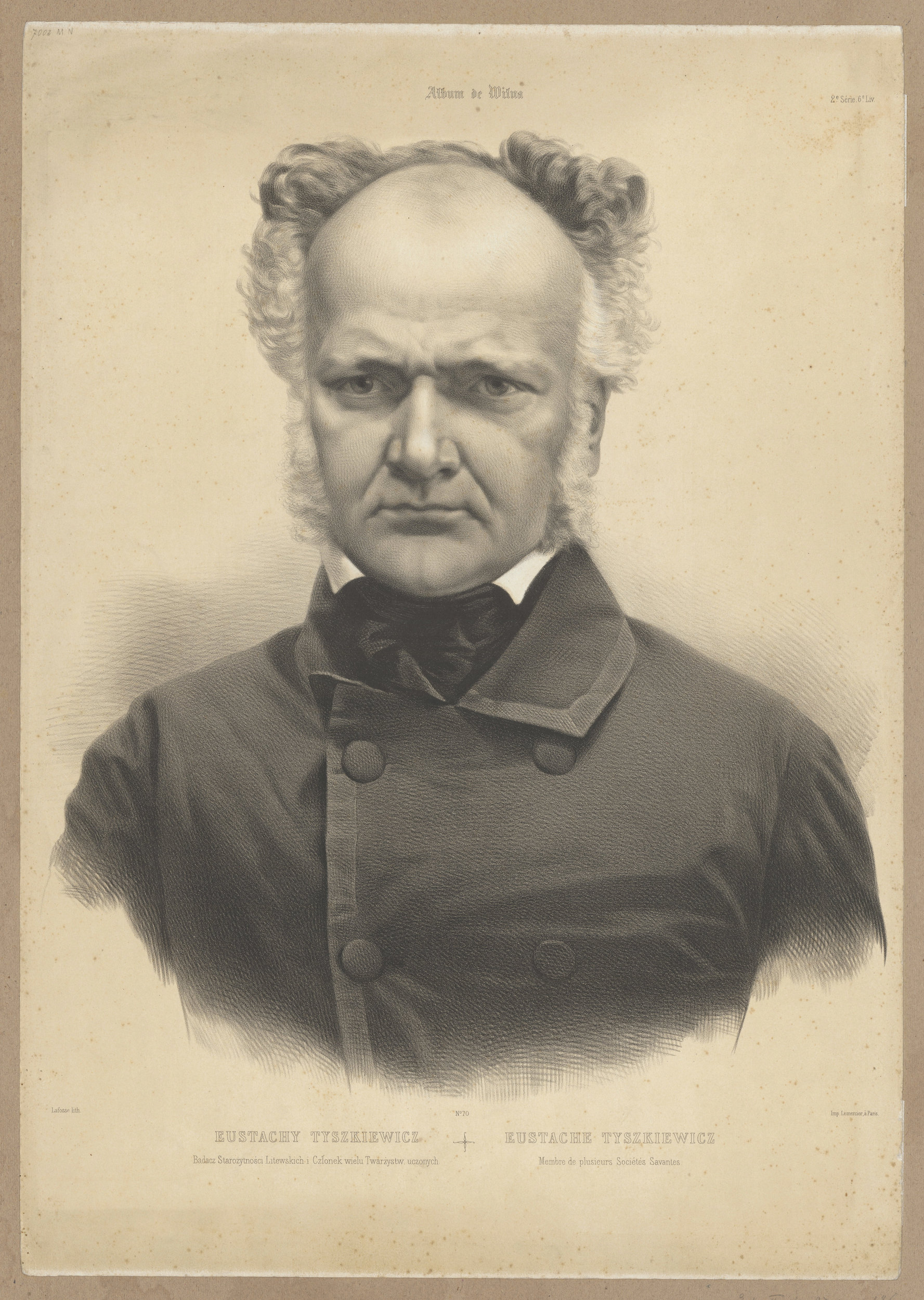 Беларуская (тарашкевіца): Партрэт Яўстаха Тышкевіча (Jaŭstach Tyškievič)